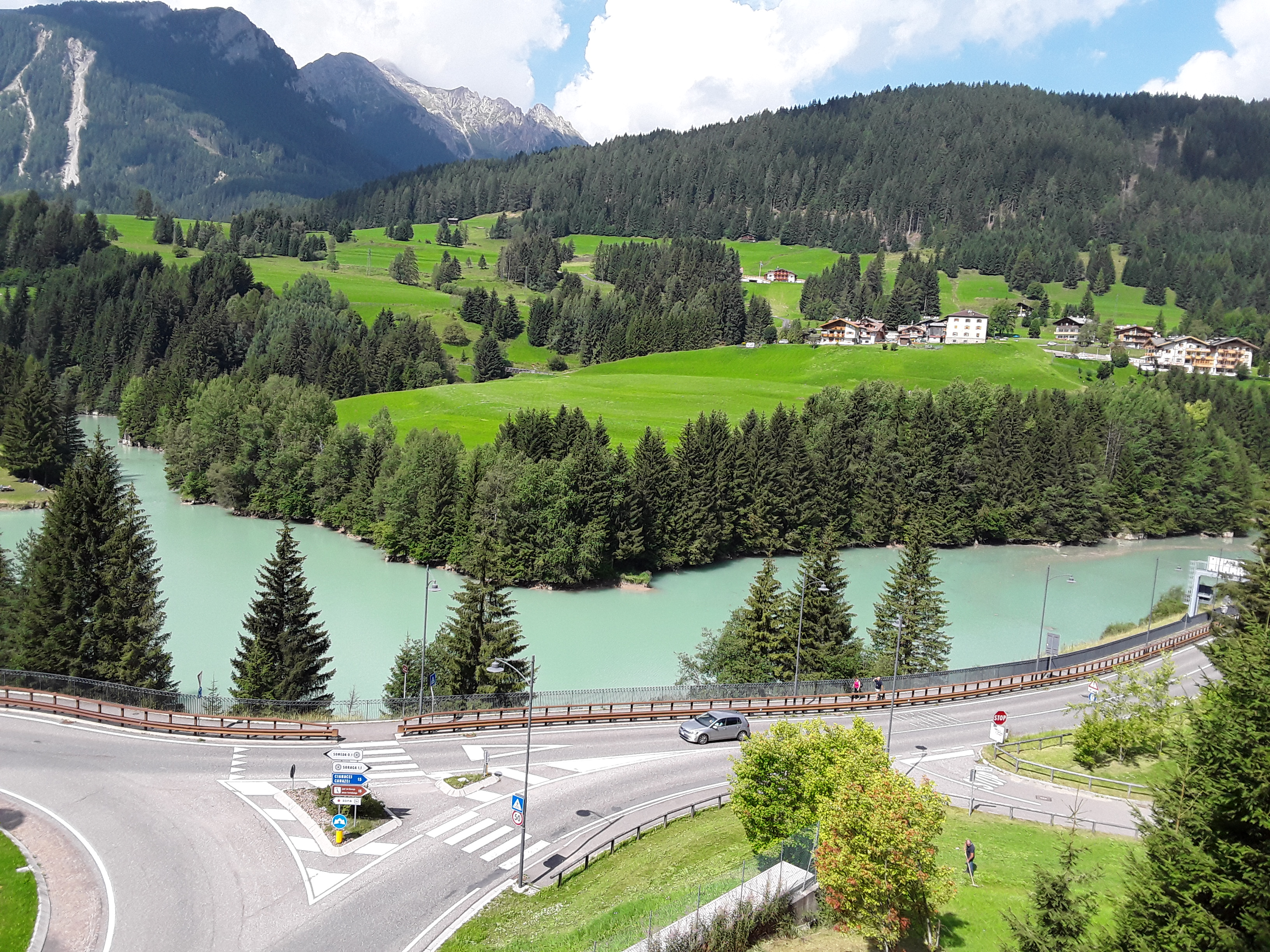 Rotatoria del Lago di Soraga di Fassa